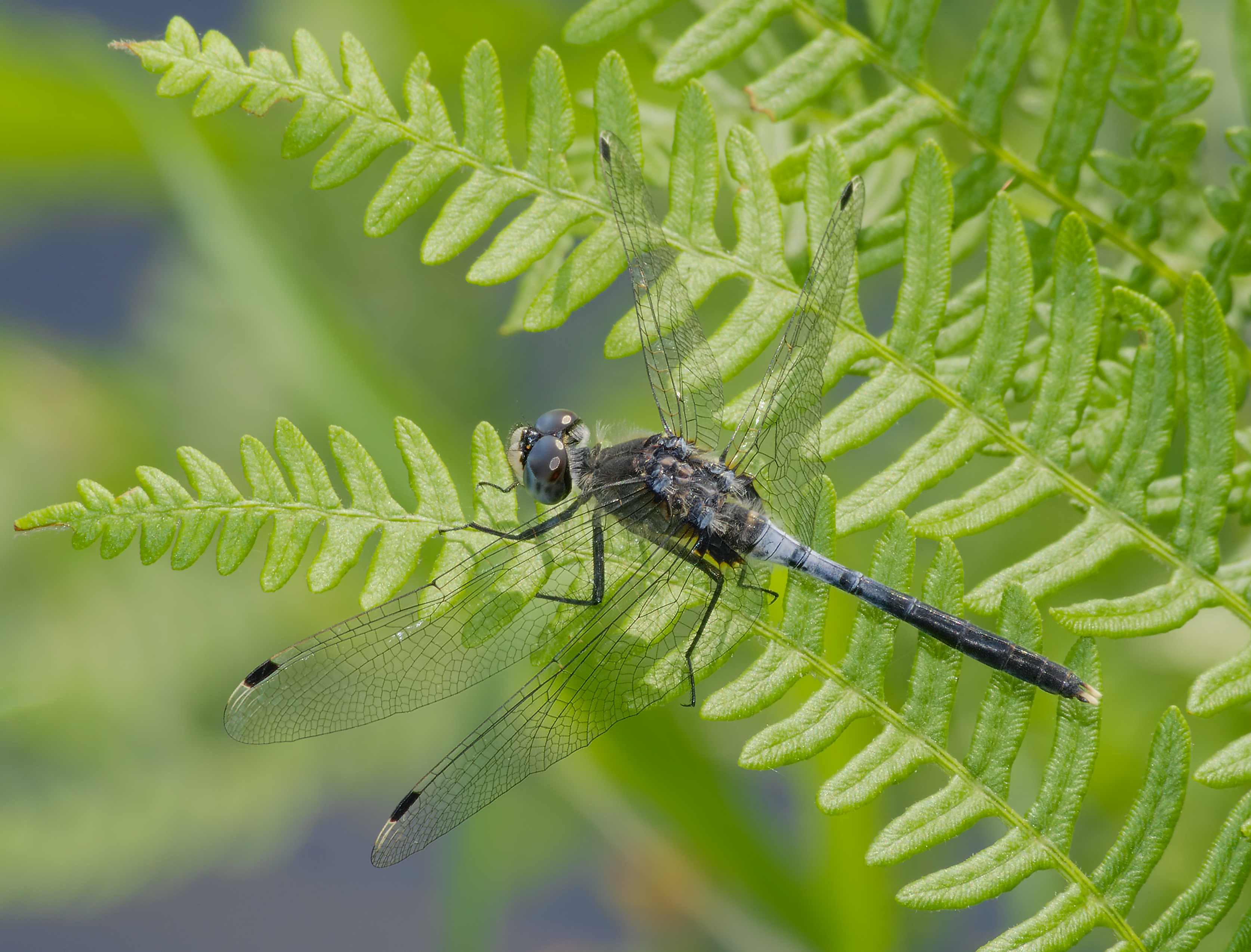 Östliche Moosjungfer - Leucorrhinia albifrons, Männchen. Aufgenommen am Zadlitzgraben in Pressel, Laußig, Sachsen, Deutschland.